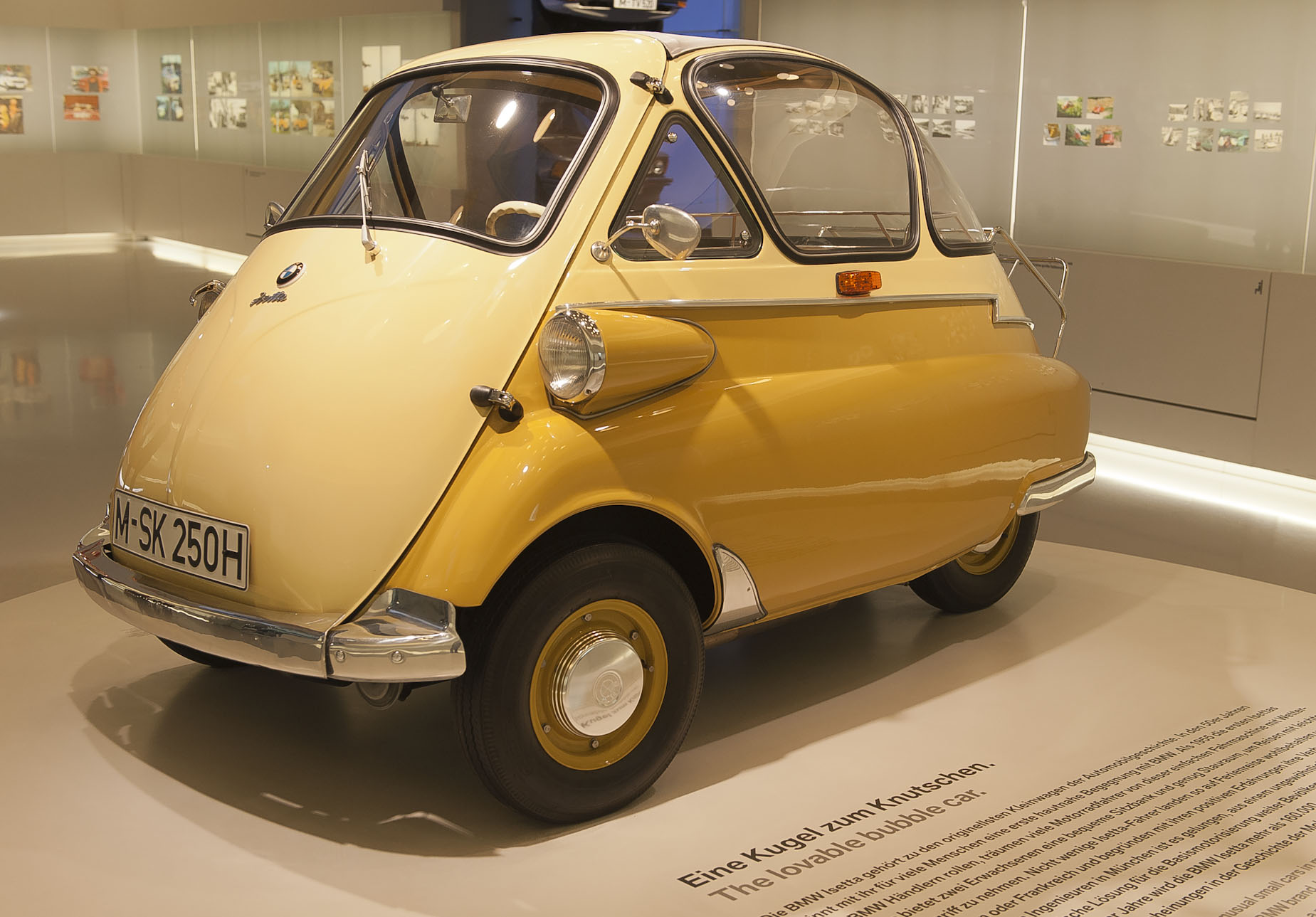 BMW Isetta. BMW Museum, München